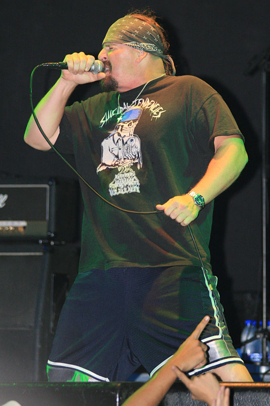 Suicidal Tendencies no Circo Voador